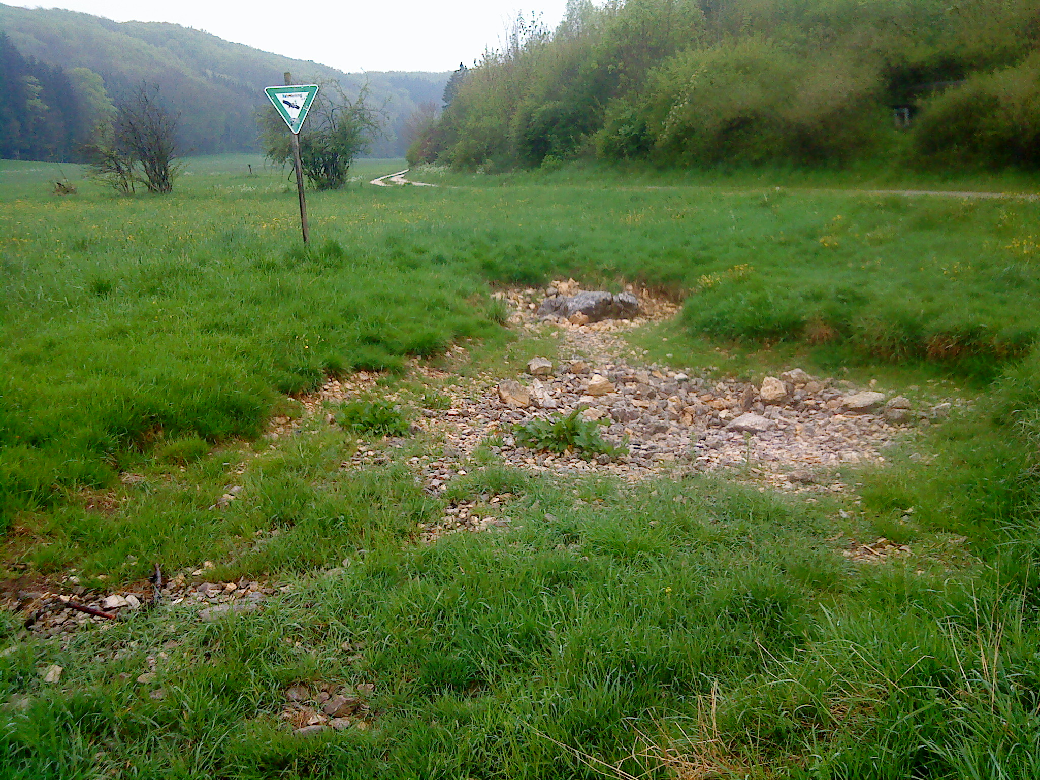 Der trockene Hungerbrunnen (Naturdenkmal) 2010 bei Gerstetten, Schwäbische Ostalb.